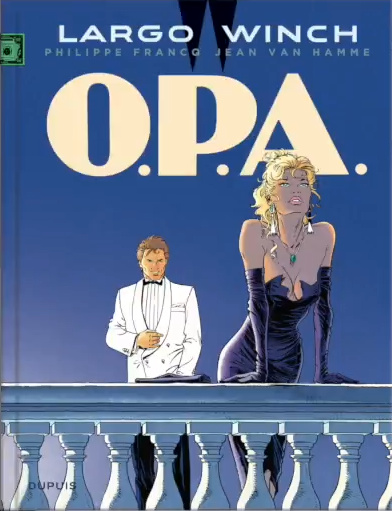 Couverture d'un des albums de Largo Winch (bande dessinée)